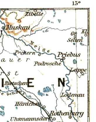 Ausschnitt aus der Karte des Königreiches Sachsen von 1895 mit den damals preußisch-schlesischen Städten Muskau, Priebus und Rothenburg.